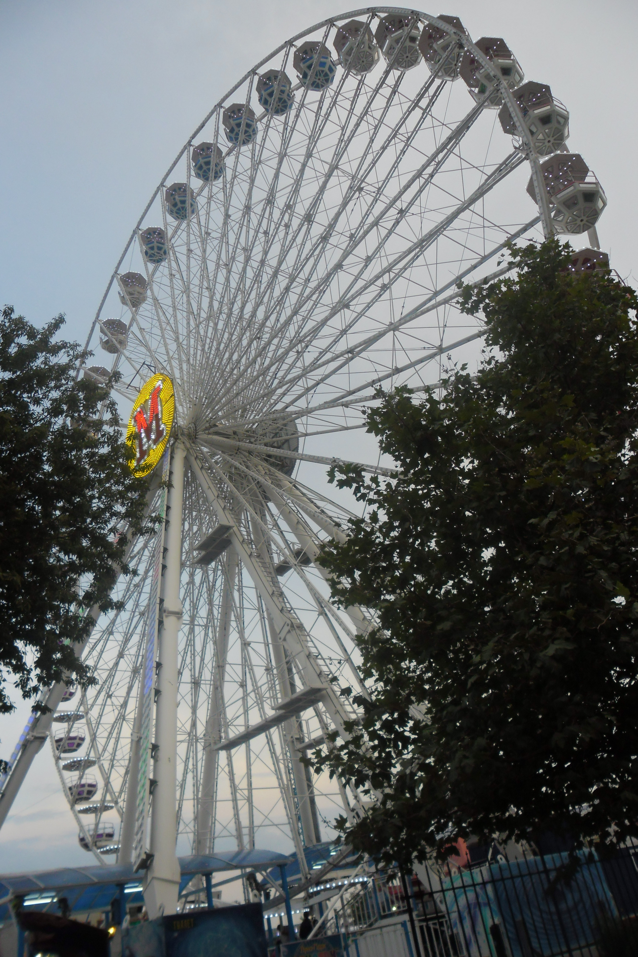 Фото